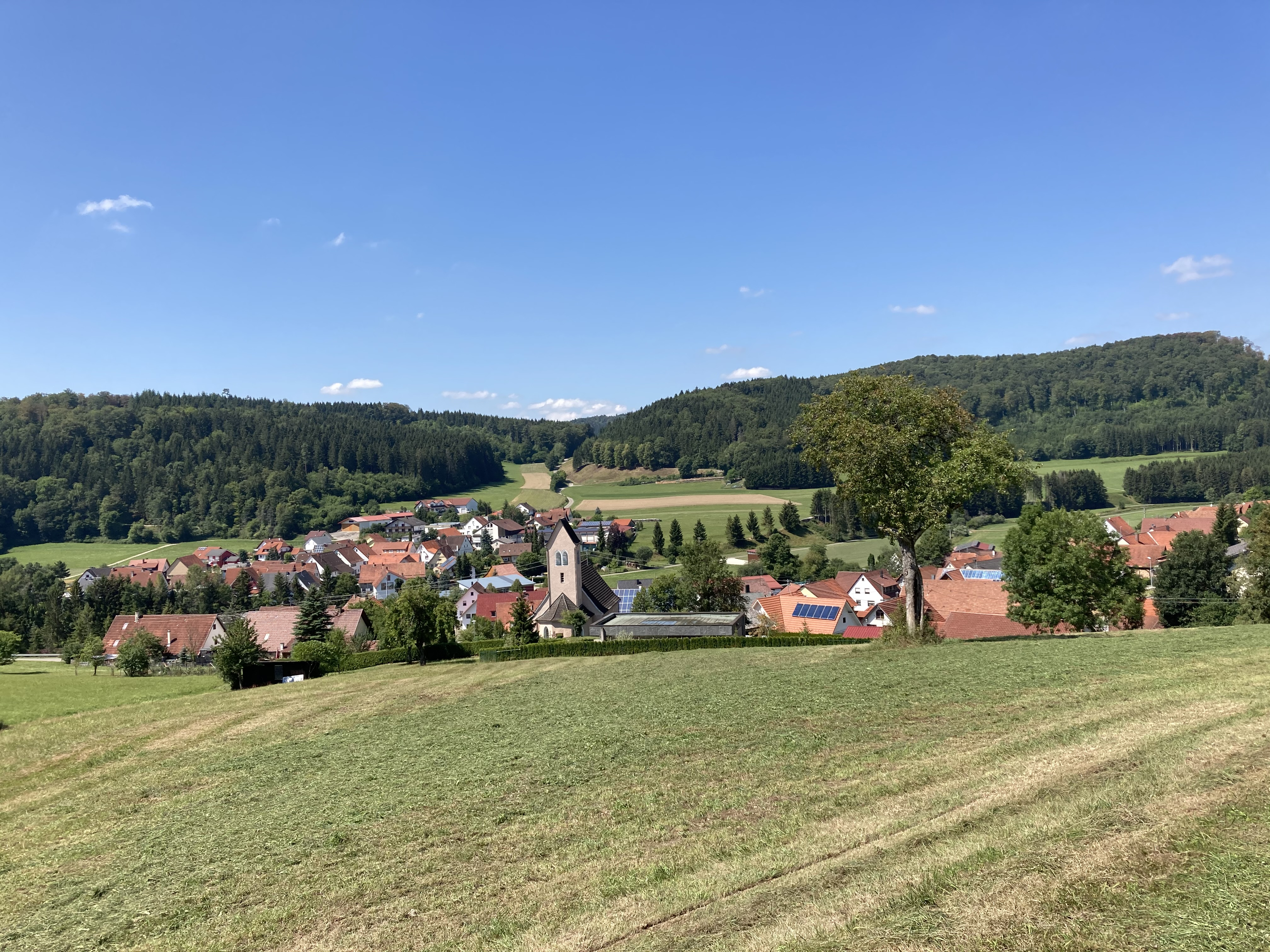 Hörschwag, Stadtteil von Burladingen